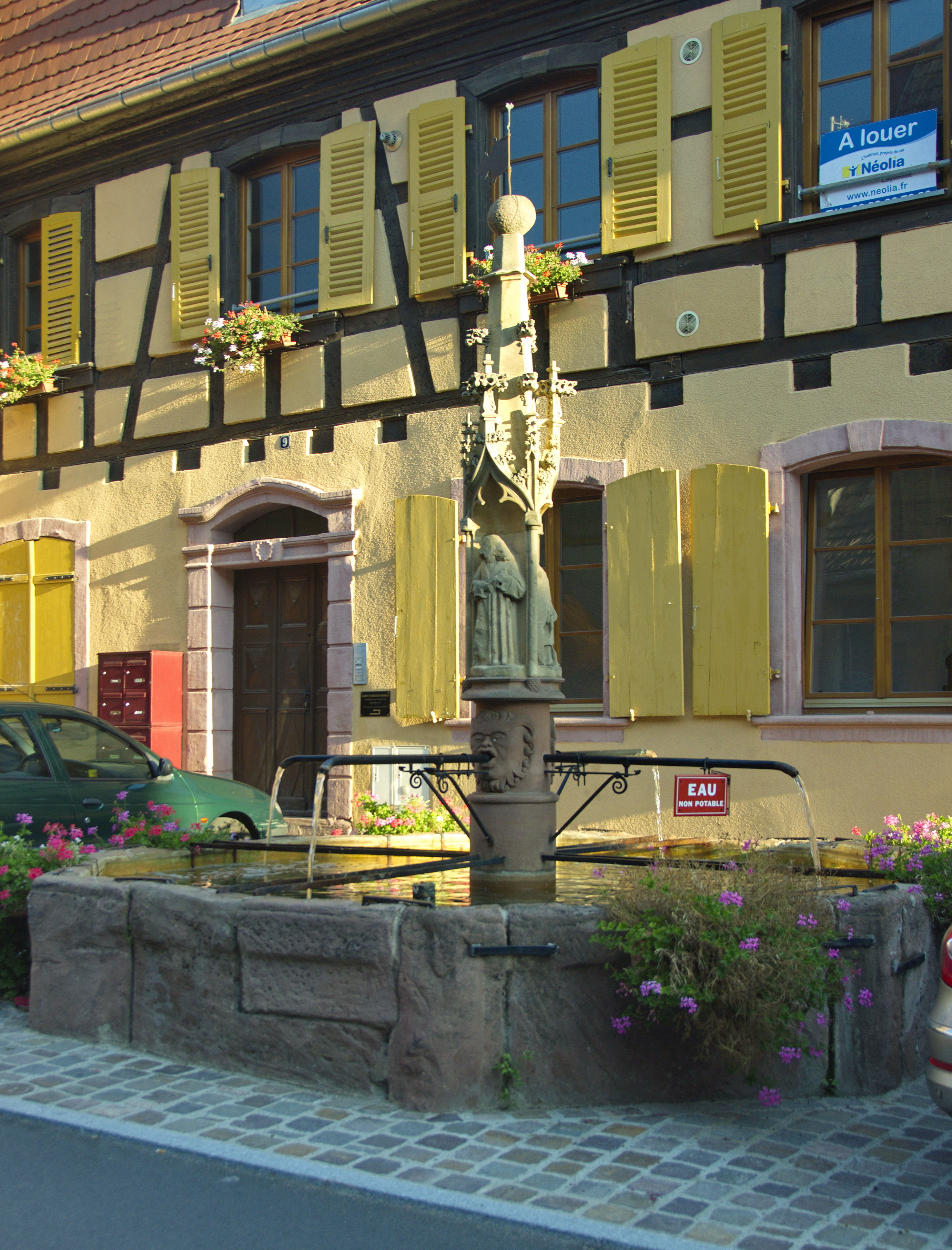 Fontaine, classé 1922 .